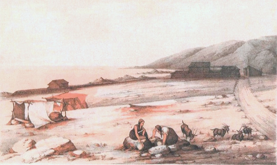 Paposo según Rodolfo Amando Philippi Viaje al Desierto de Atacama : hecho de orden del gobierno de Chile en el verano 1853-54, publicado en 1860